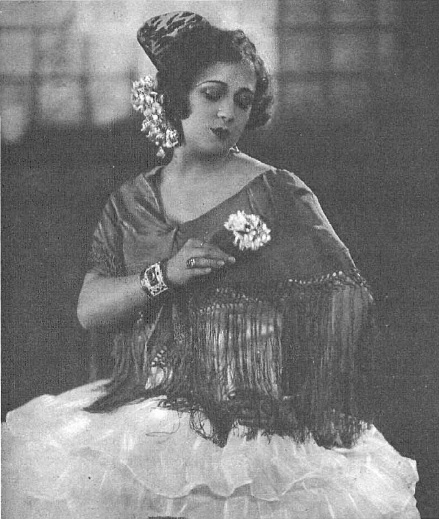 Fotografía de la cantante española Elvira de Amaya publicada en 1926 con motivo de su actuación en el Teatro Principal de Tarragona.